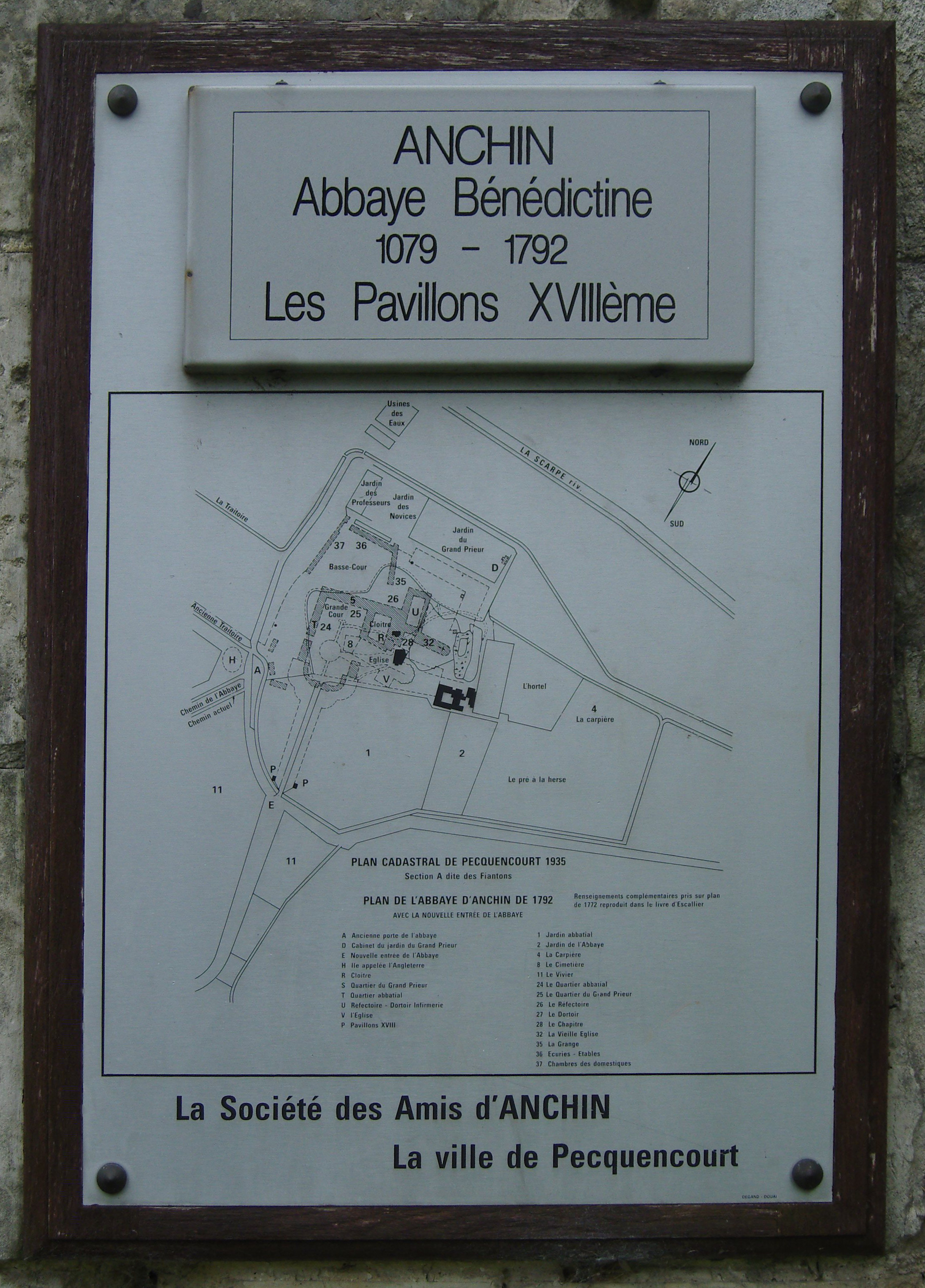 Plan de l'abbatiale de Pecquencourt en 1792